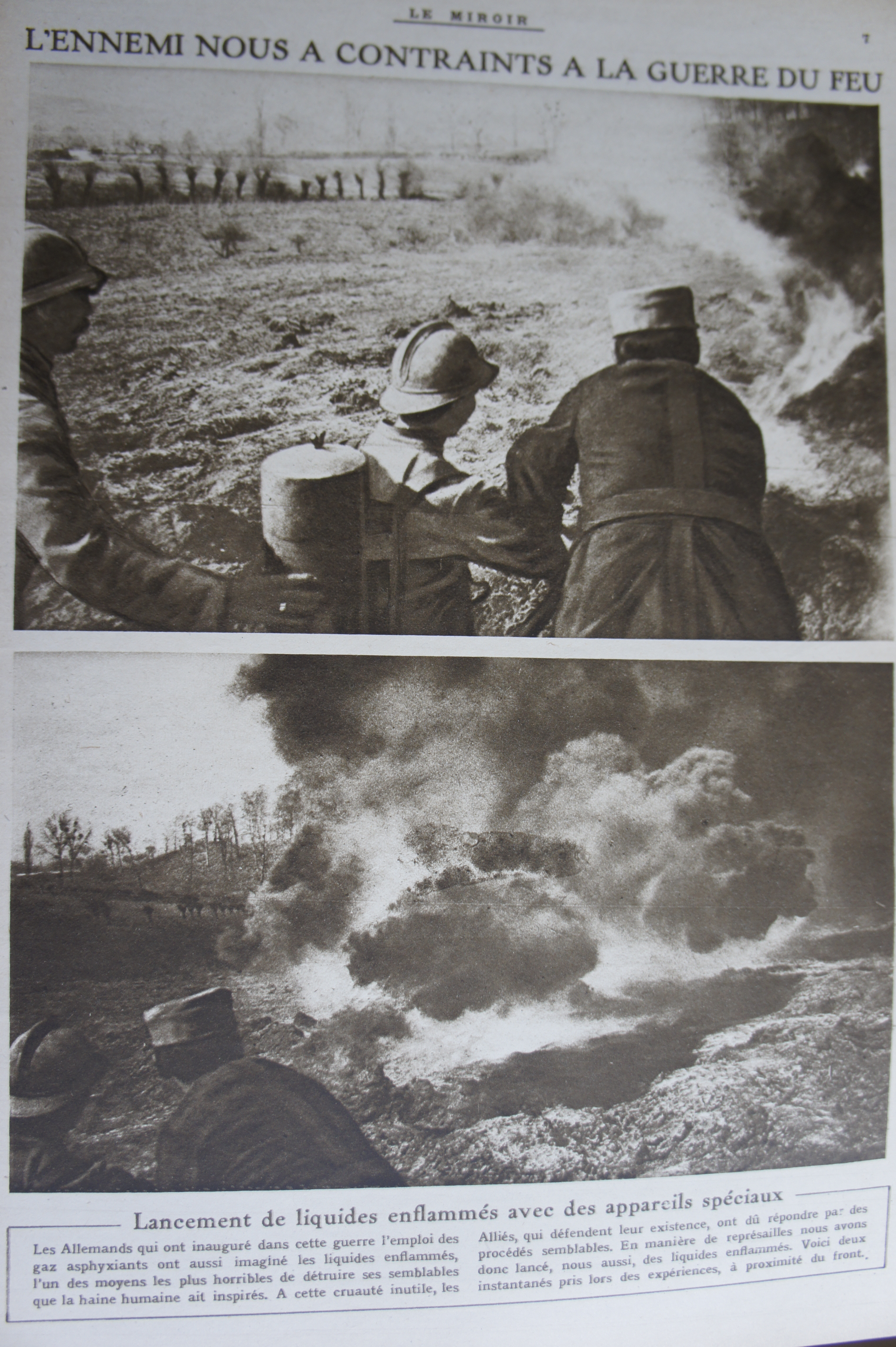 Photographie publiée par l'hebdomadaire Le Miroir le 1 juillet 1917 page 7.